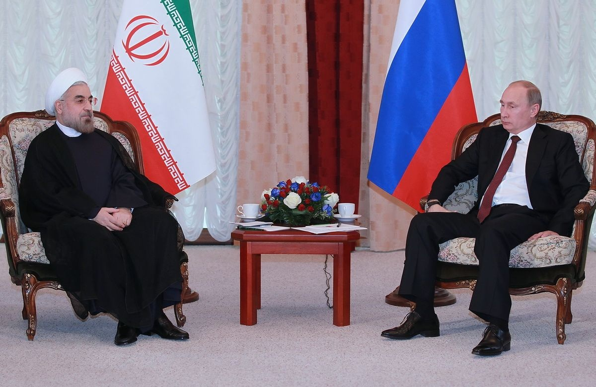 Vladimir Putin meeting with Hassan Rouhani, 13 September 2013